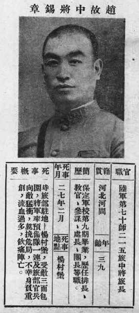 抗戰軍人忠烈錄第一輯中的烈士遺像